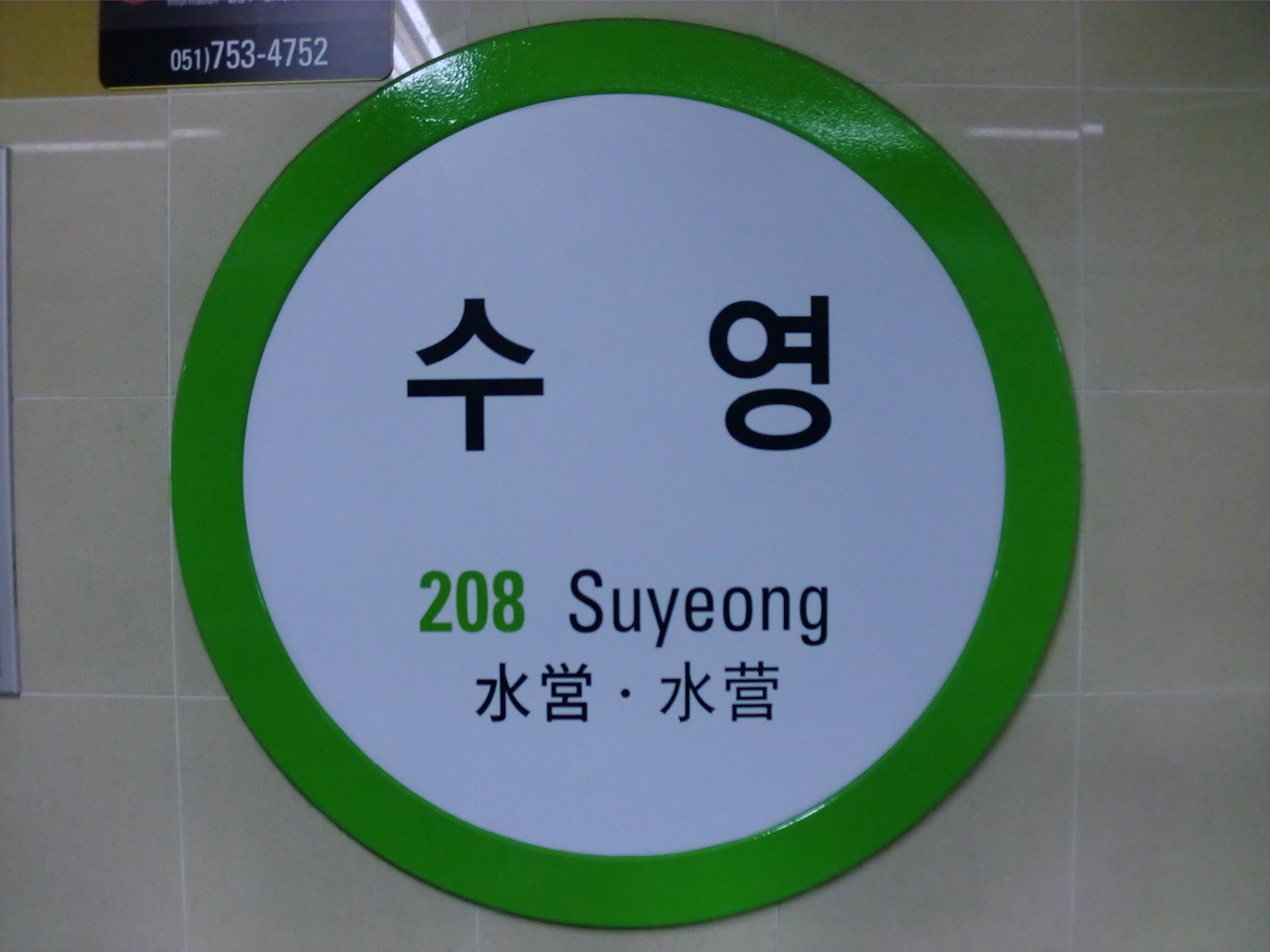 부산도시철도2호선 수영역의 역명판